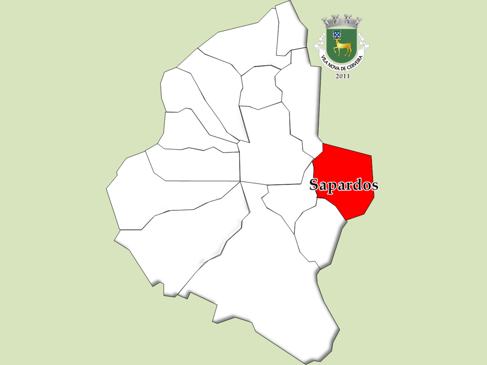 Censos 1864/2011